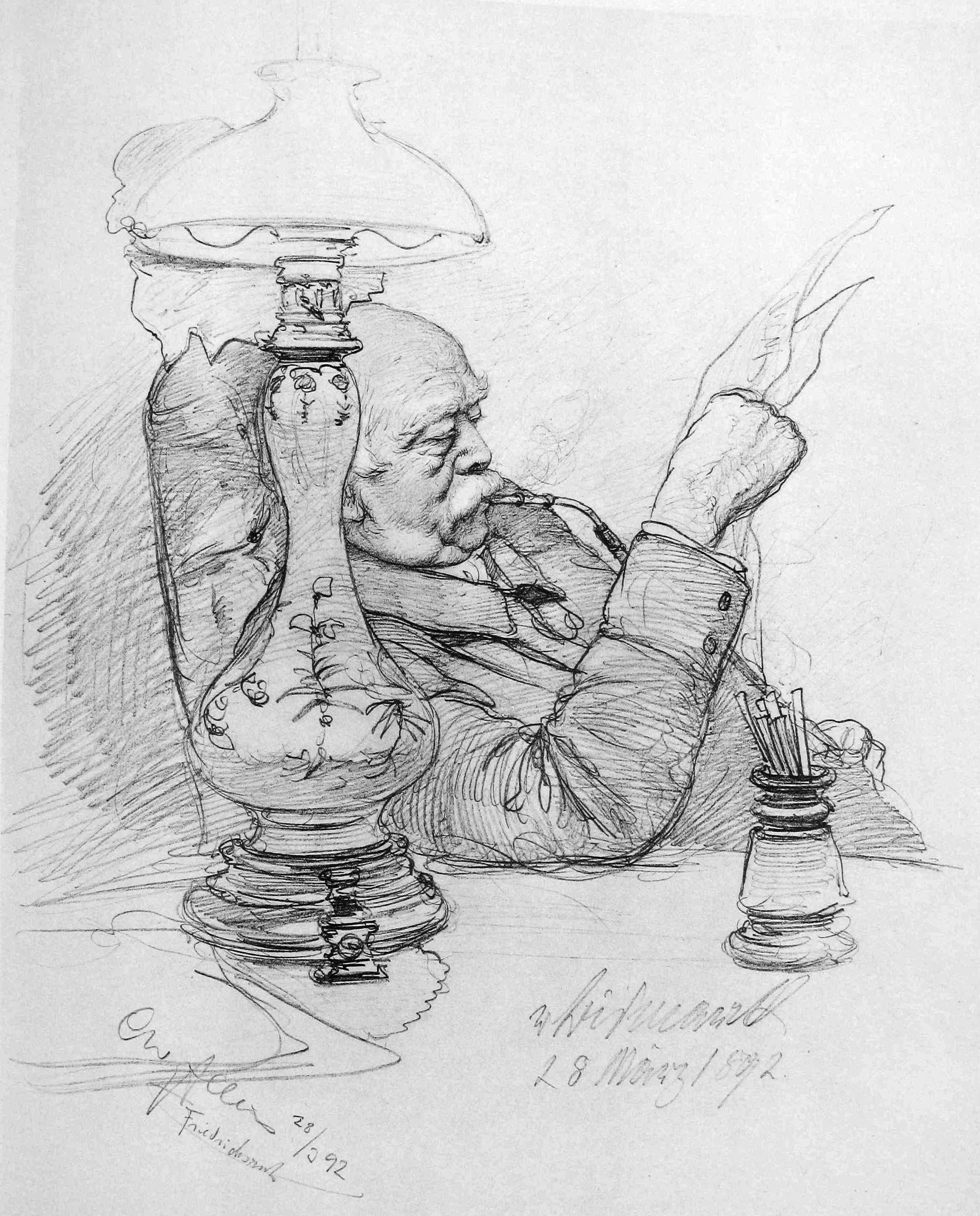 Fürst Otto von Bismarck